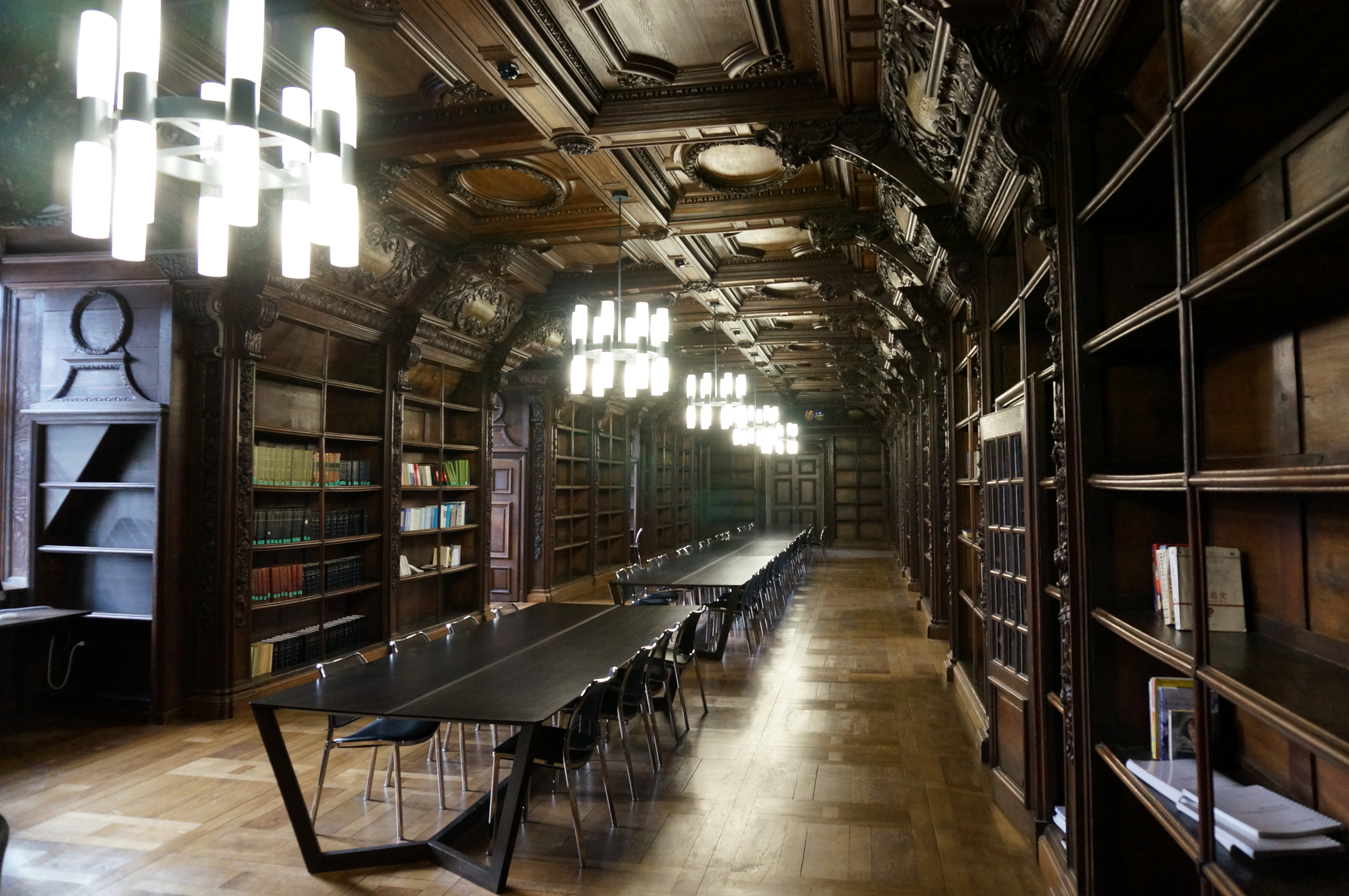 l'intérieur.